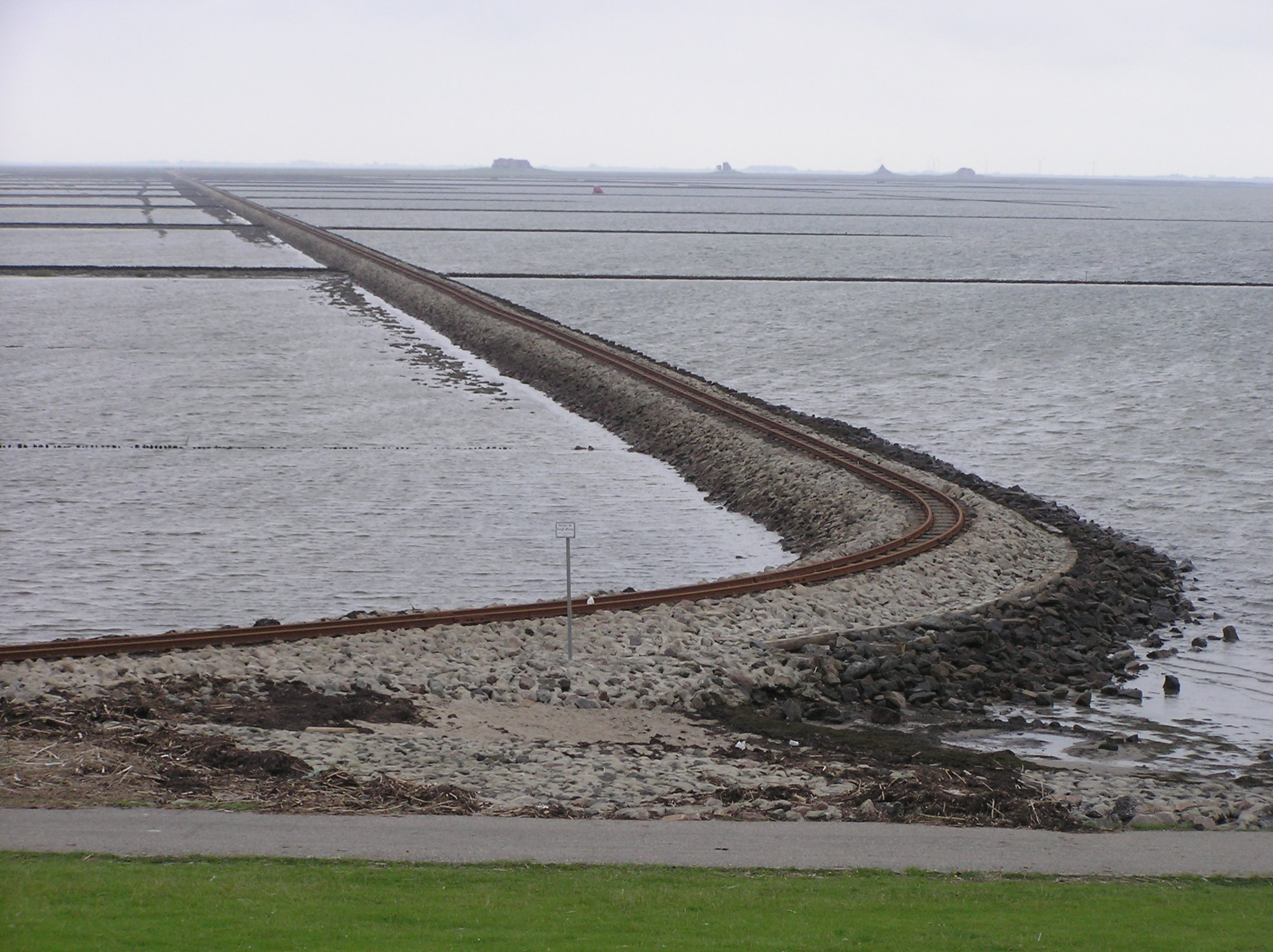 Lorenbahn Lüttmoorsiel-Nordstrandischmoor